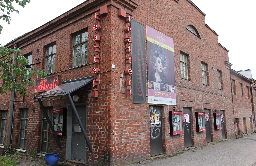 Sisäänkäynti Teatteri Vantaan Silkkisaliin Vantaan Tikkurilassa.